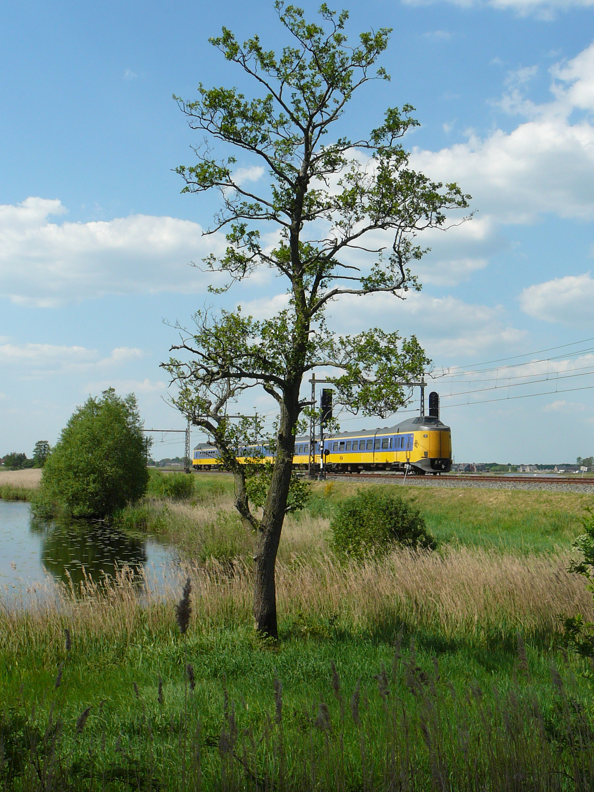 ICM 4218 Utrecht Centraal - Leeuwarden, Wolvega